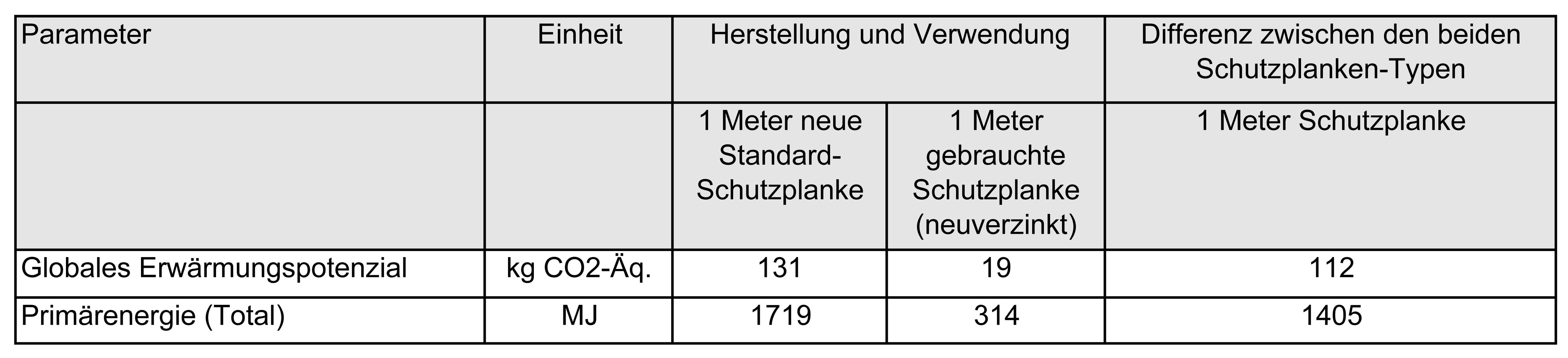 Der ökobilanzielle Vergleich von neuen und neuverzinkten Schutzplanken zeigt, dass durch Neuverzinken pro Meter Schutzplanke 112 kg CO2 und 1405 MJ Primärenergie eingespart werden.